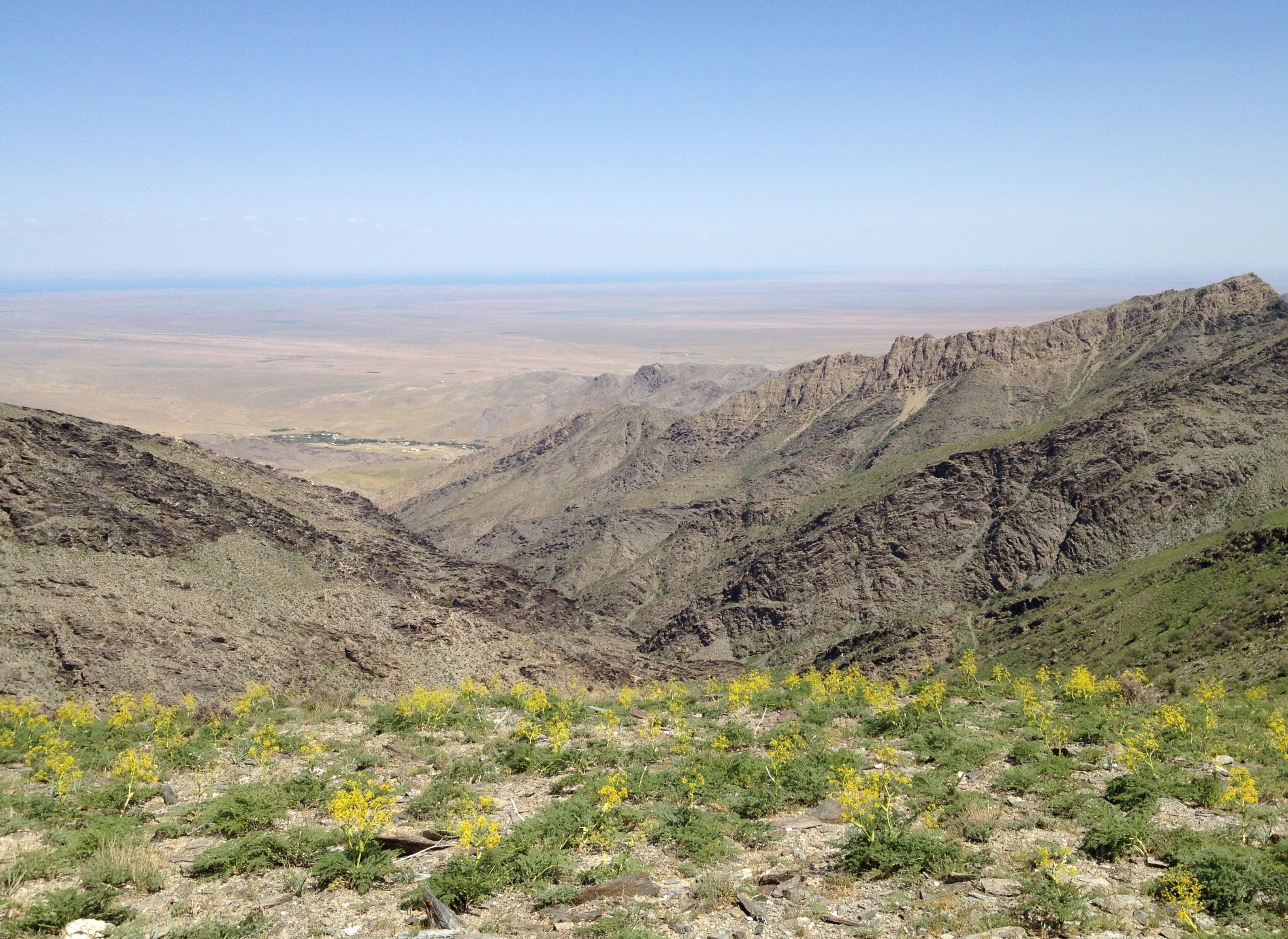 Вид на озеро Айдаркуль с Нуратинского хребта